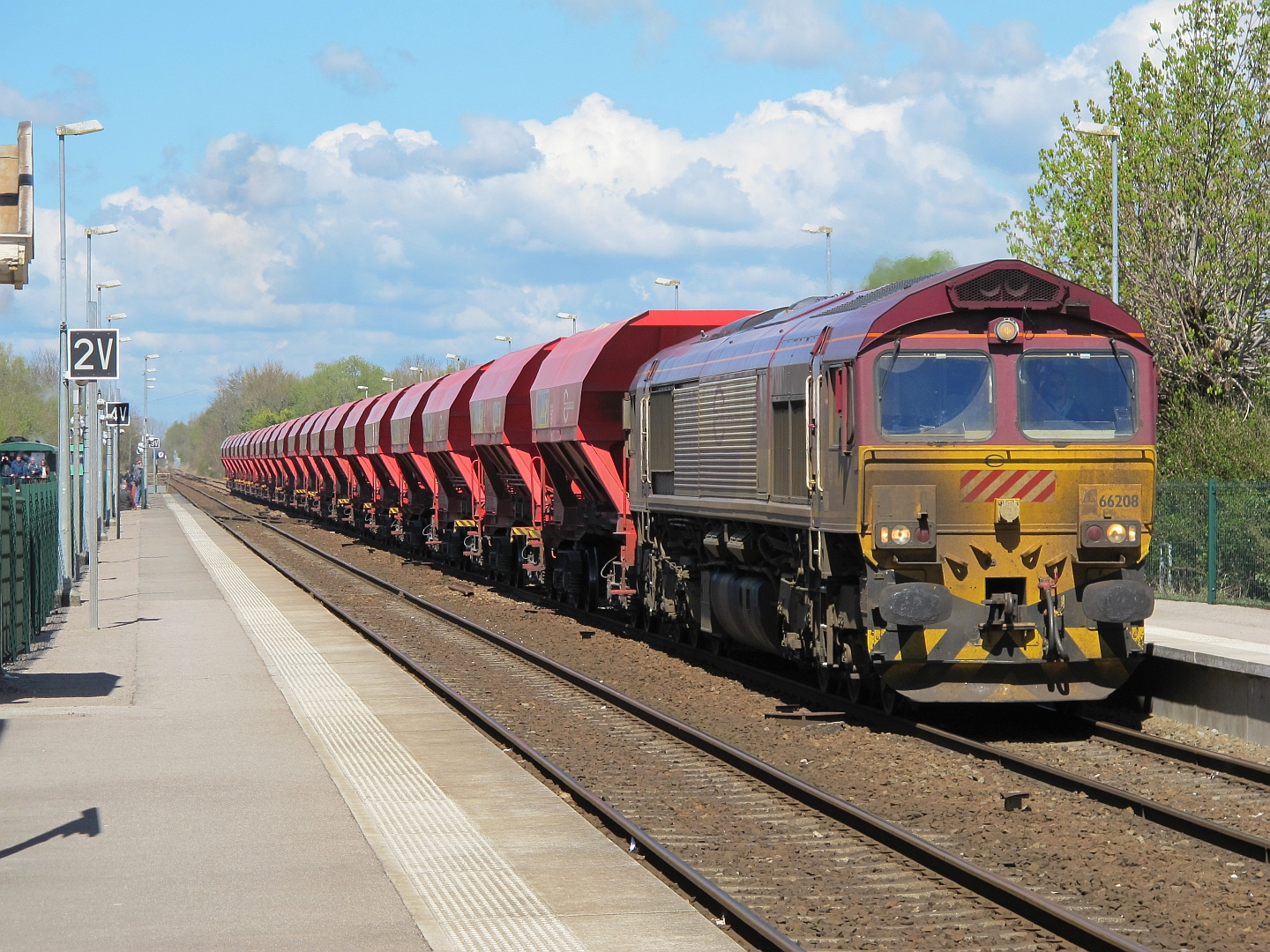 Un train de wagons-trémies Euro Cargo Rail emmené par la « Class 66 » 66208, passe en gare de Noyelles le 17 avril 2016.